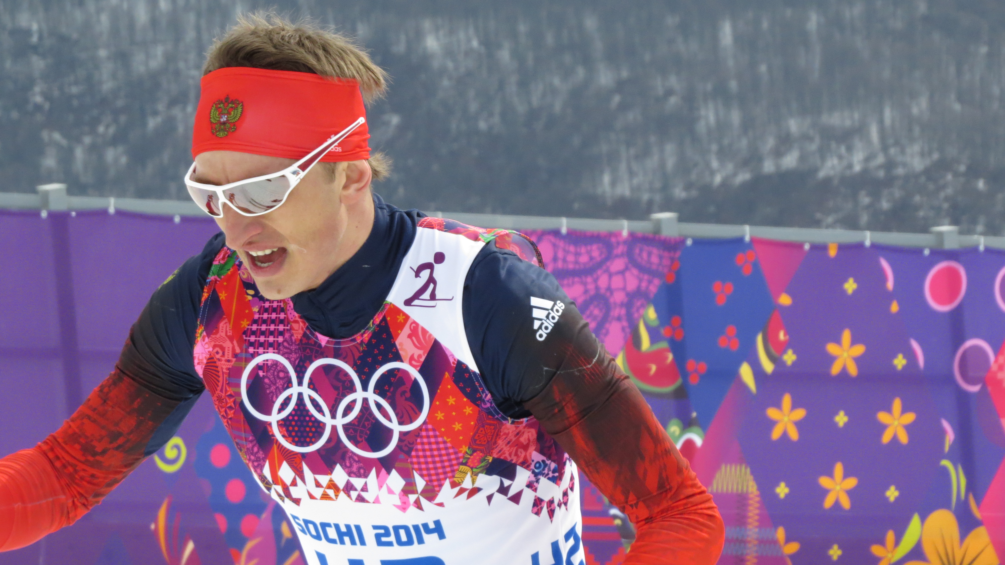 Лыжные гонки на зимних Олимпийских играх 2014 — 15 км классическим стилем (мужчины)